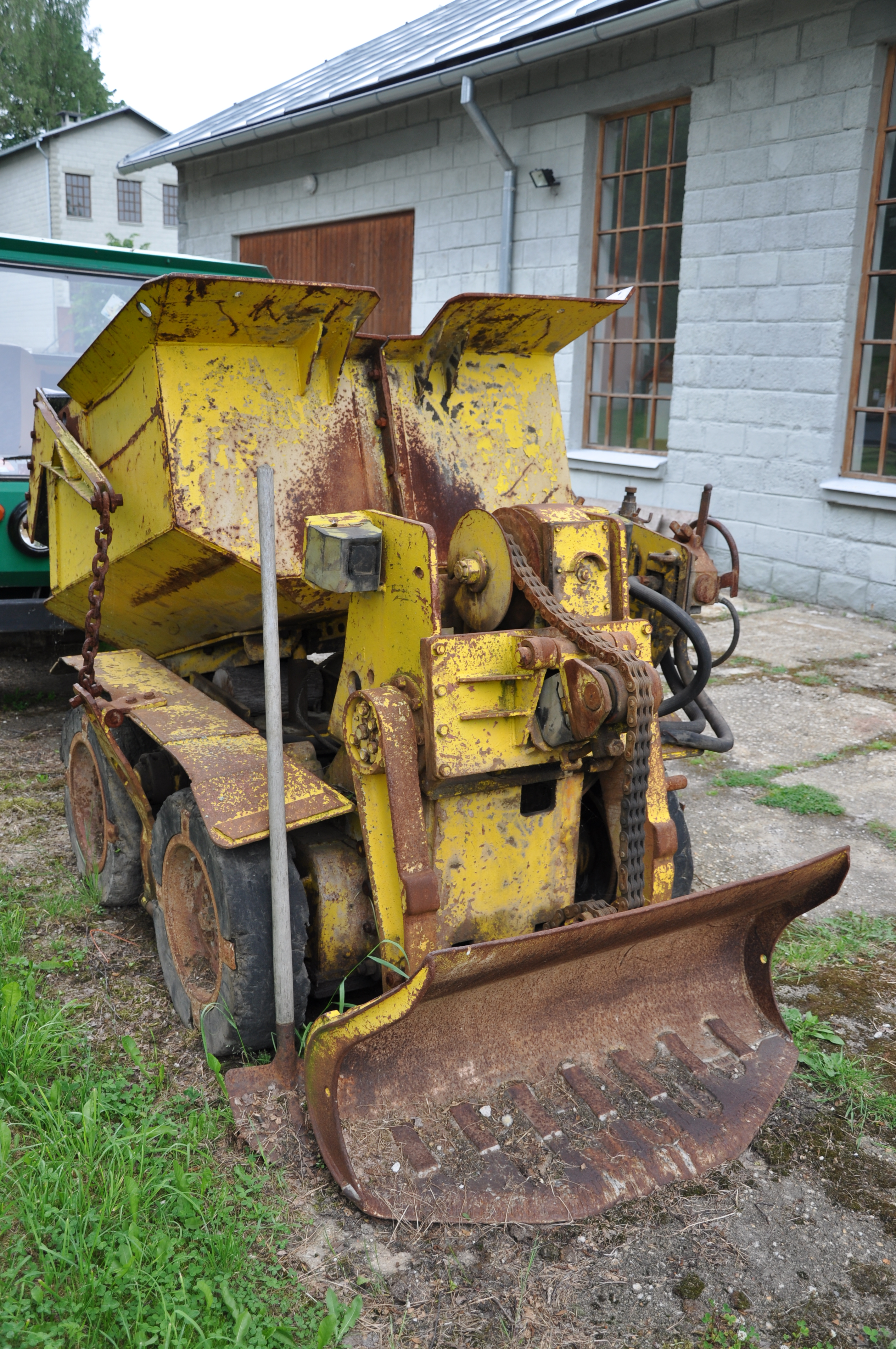 KAVO, zásobníkový lopatový přehazovací nakladač